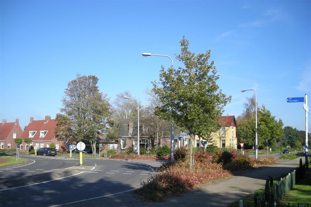 Jubbega-Schurega